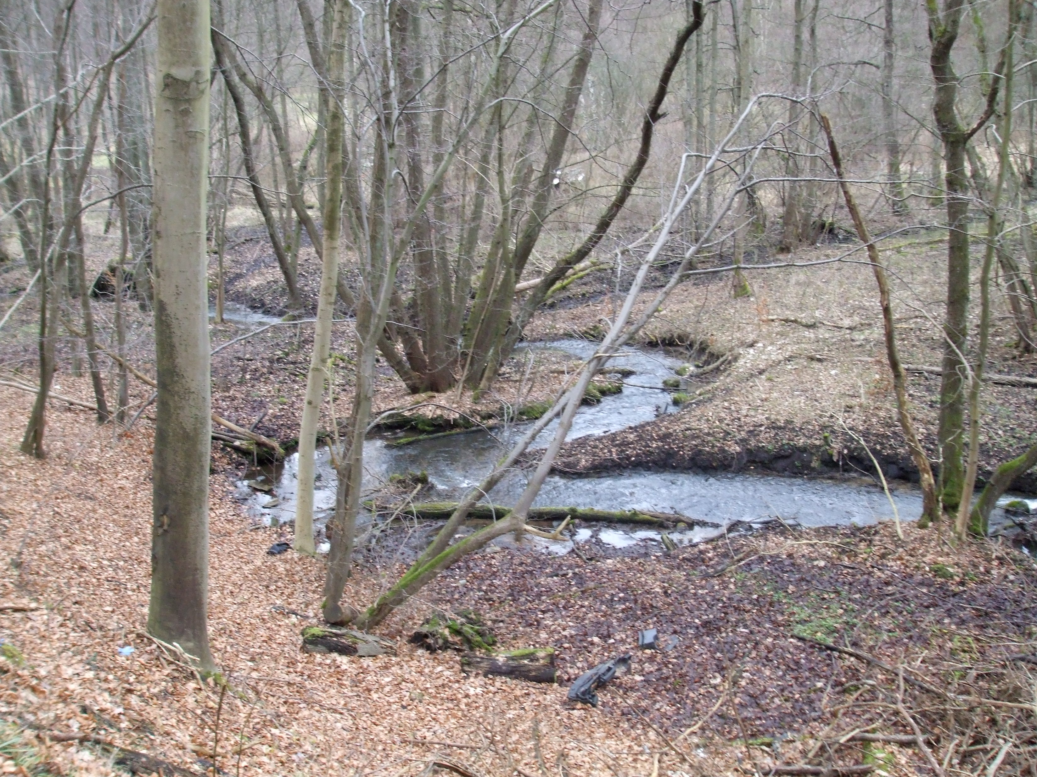 Potok Oliwski w Dolinie Radości Gdańsk, Poland